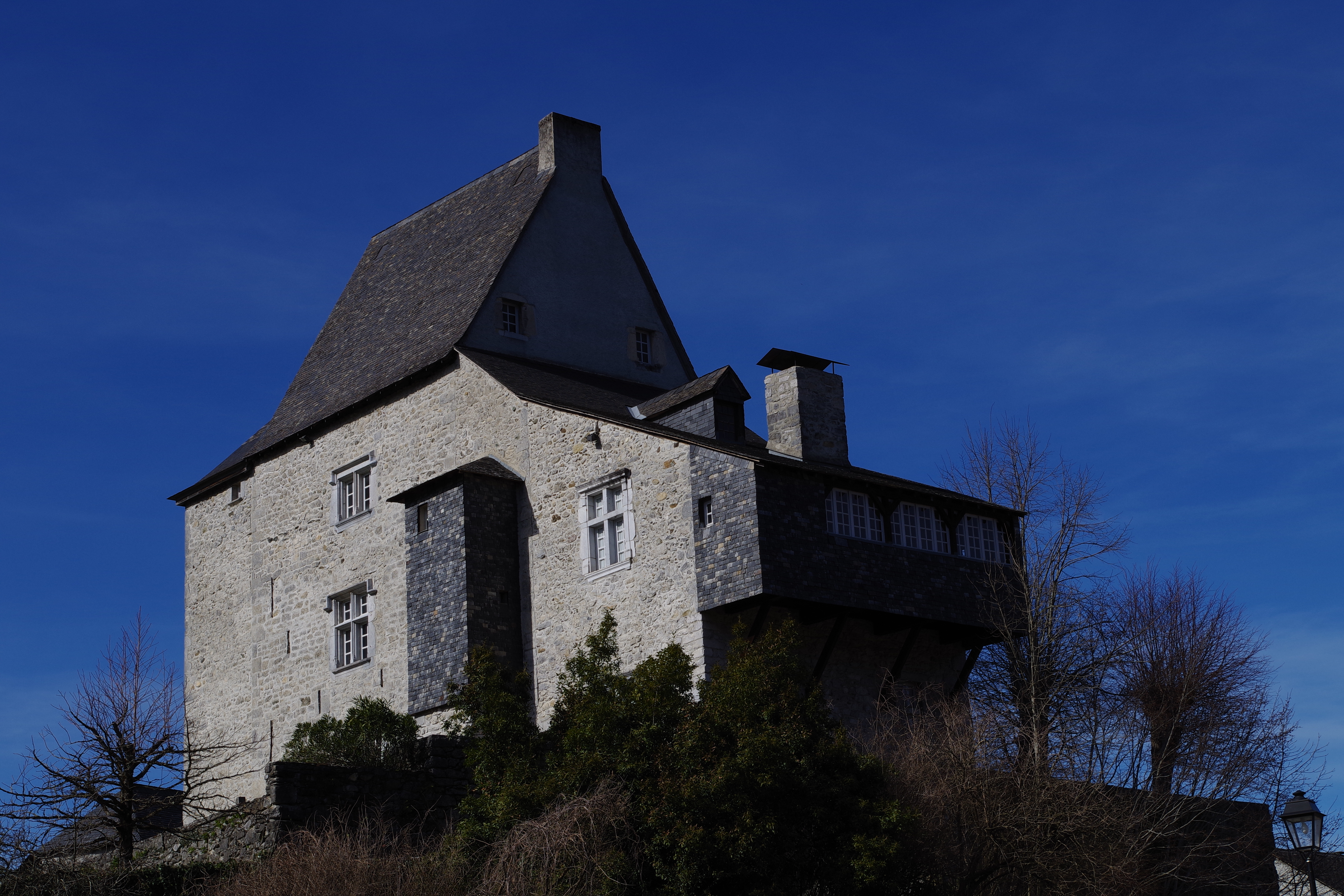 Château XVe